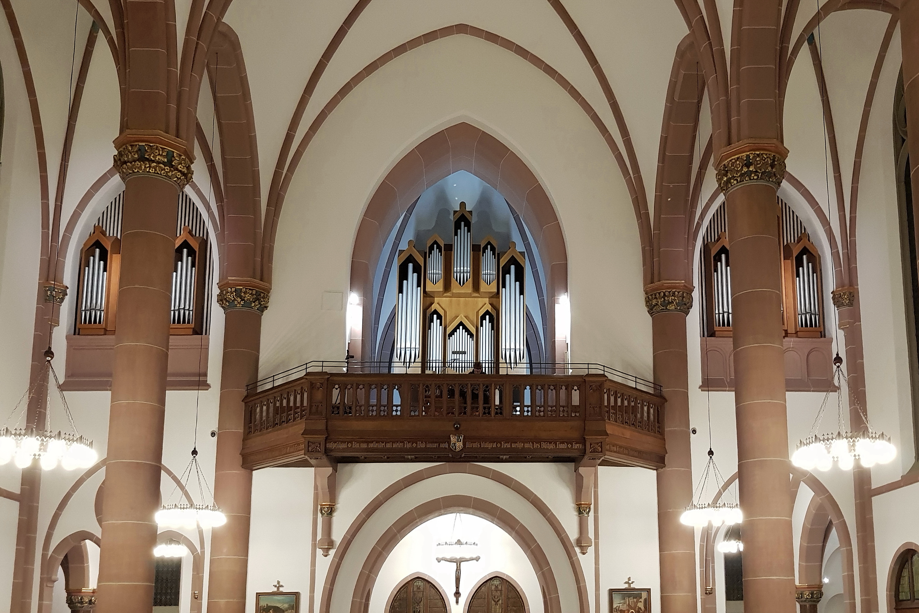 Orgel in der römisch-katholischen Pfarrkirche St. Kilian in Iserlohn-Letmathe.